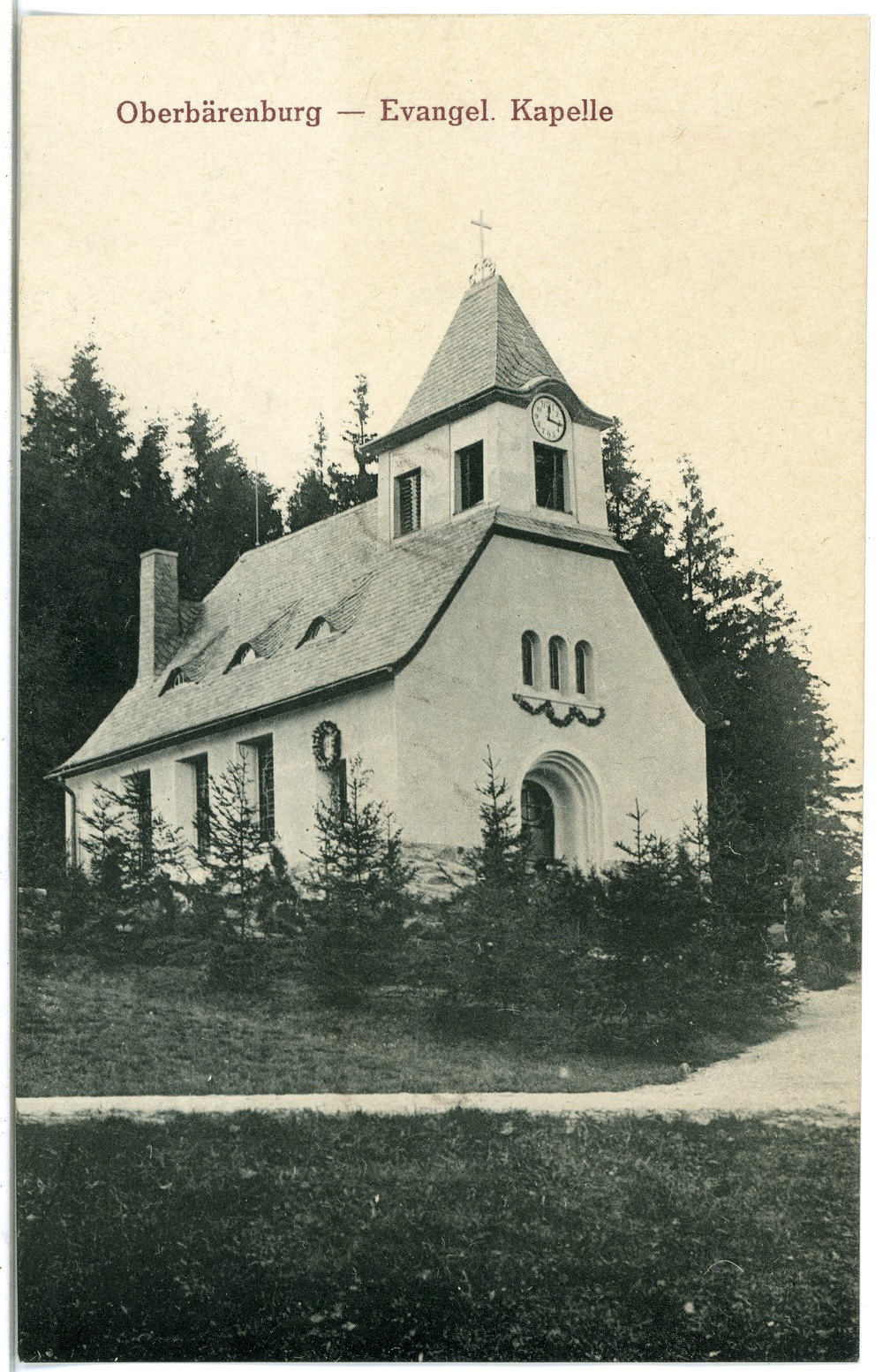 Oberbärenburg; Evangelische Kapelle This postcard is from publisher Brück & Sohn in Meißen ( postcard has a unique number 20649 and is available in a higher resolution at the publisher. This images was uploaded in a cooperation project between Wikipedians and the publisher.